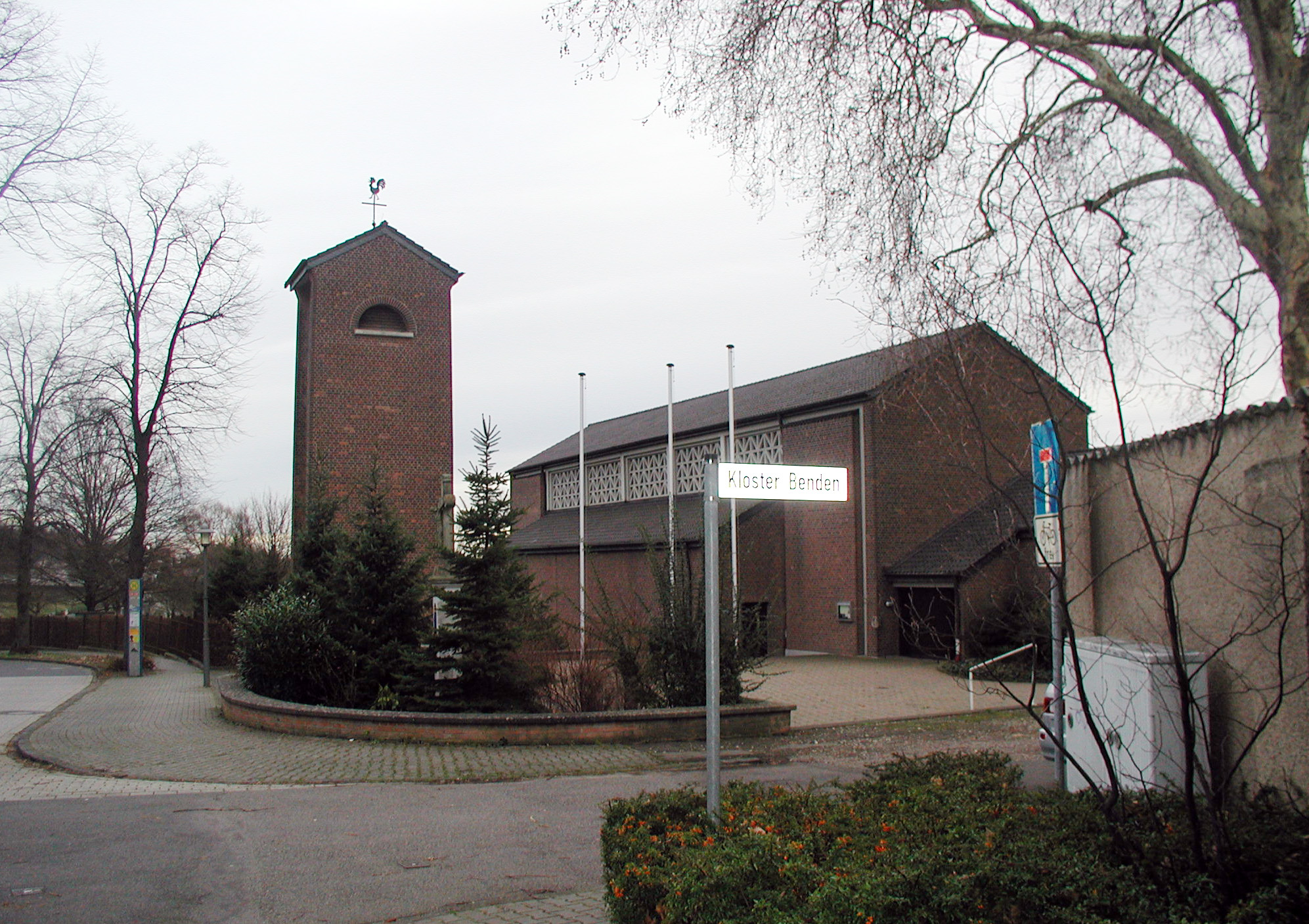 Brühl-Heide, Sankt Mariä Hilfe